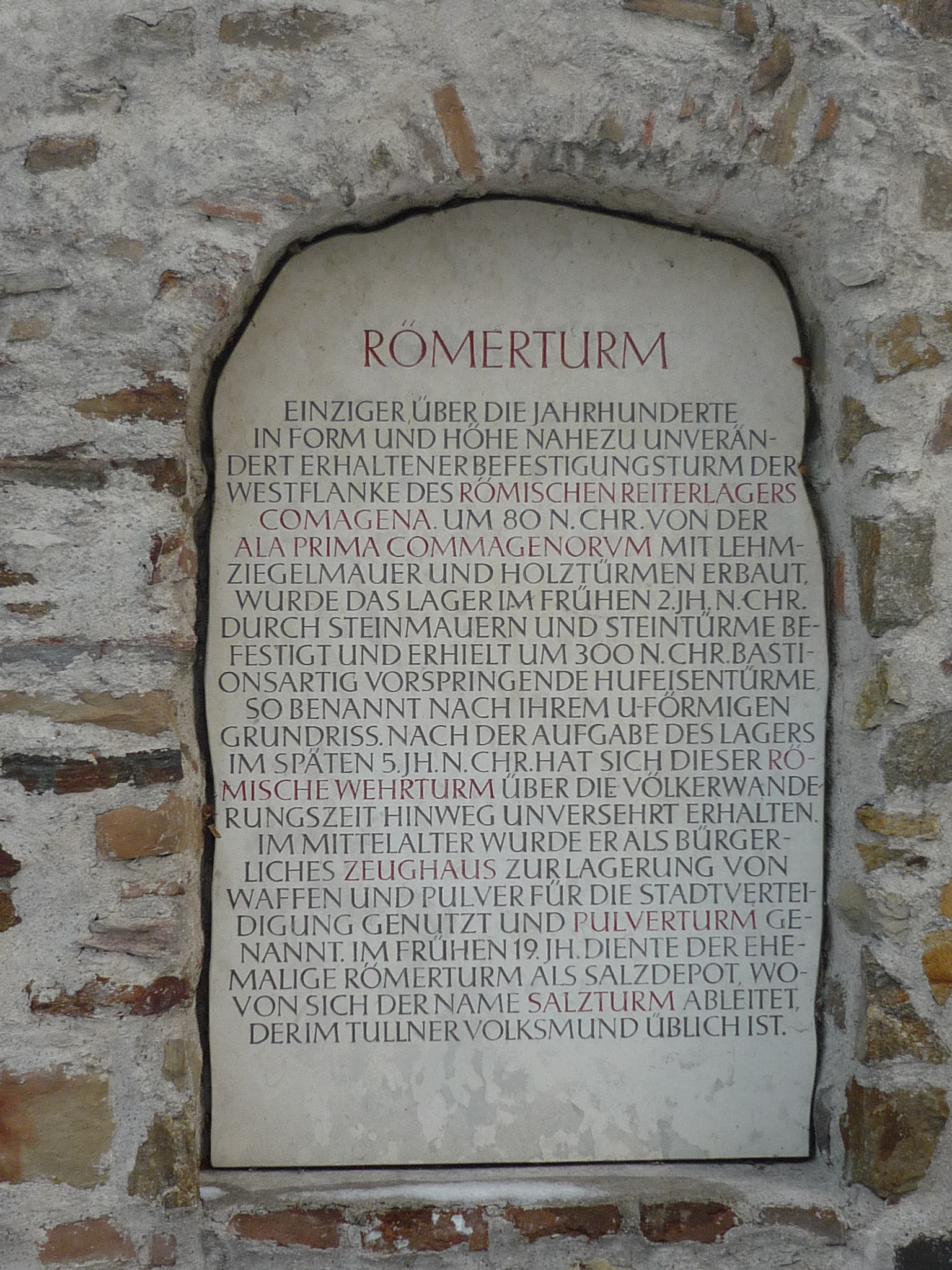 Informationstafel, eingemauert am Salzturm